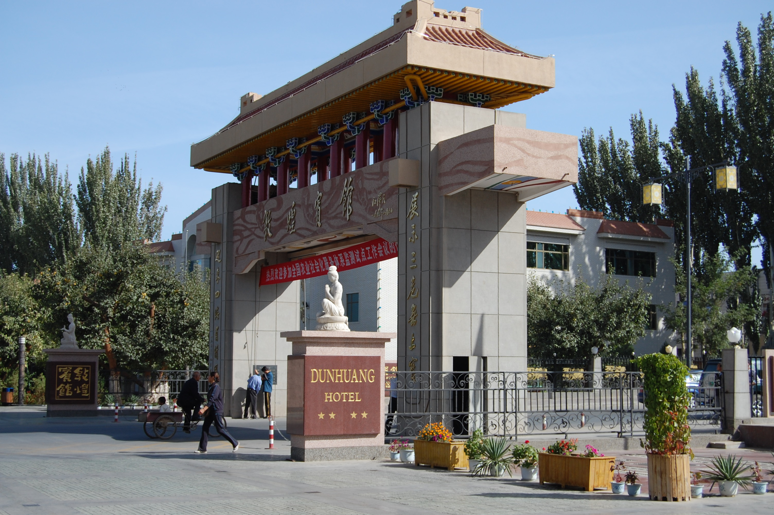 Modernes Stadttor in Dunhuang, Provinz Gansu, China